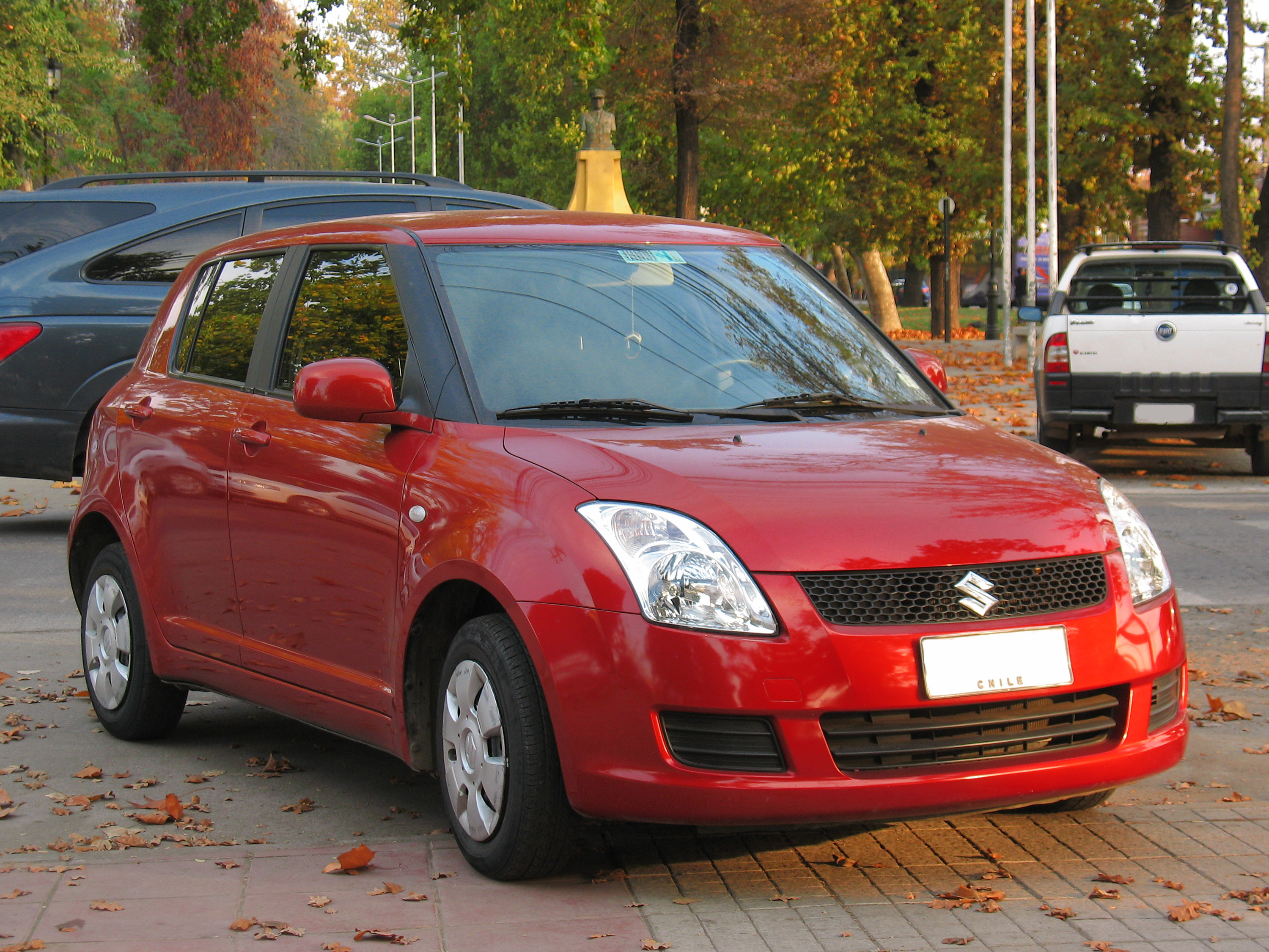 Suzuki Swift 1.3 GL 2009